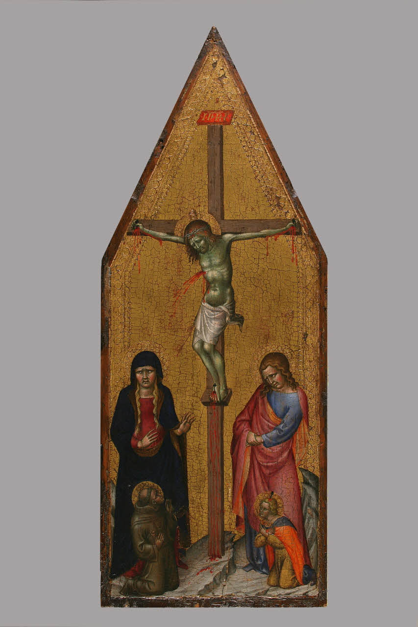 Crusifixion.jpg